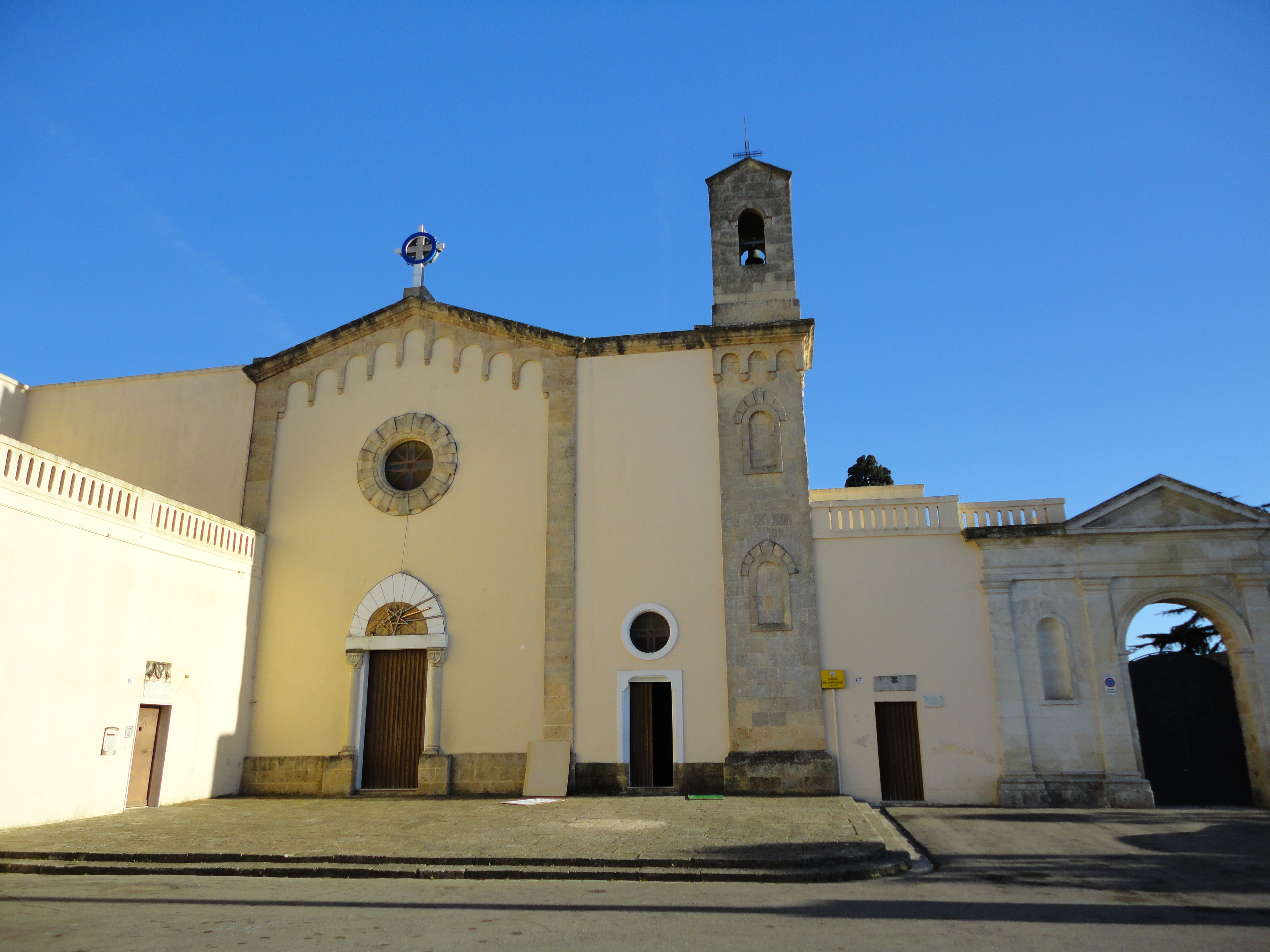 Chiesa dei Francescani Alessano, Lecce